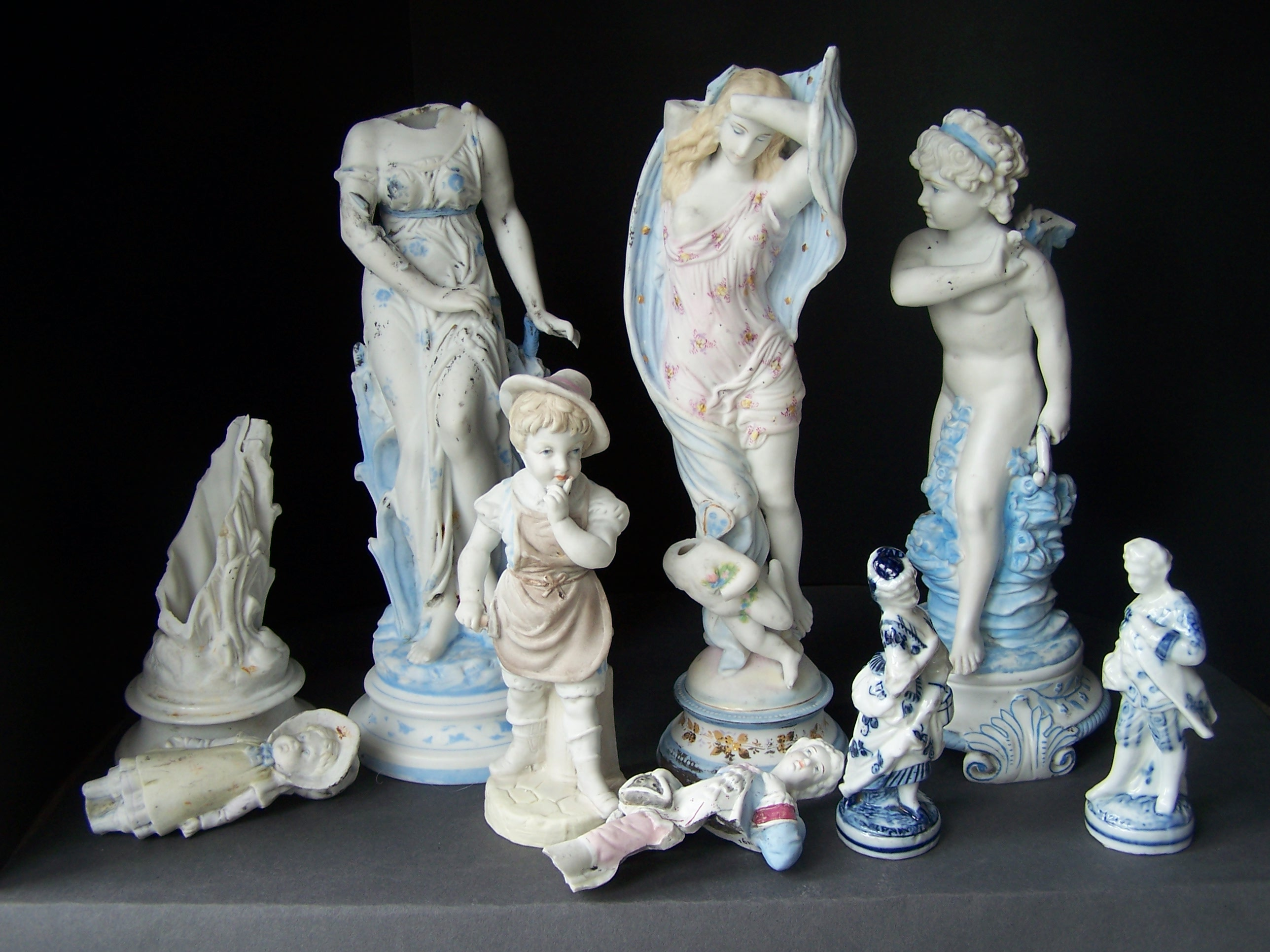 Artefakte der Cimbria